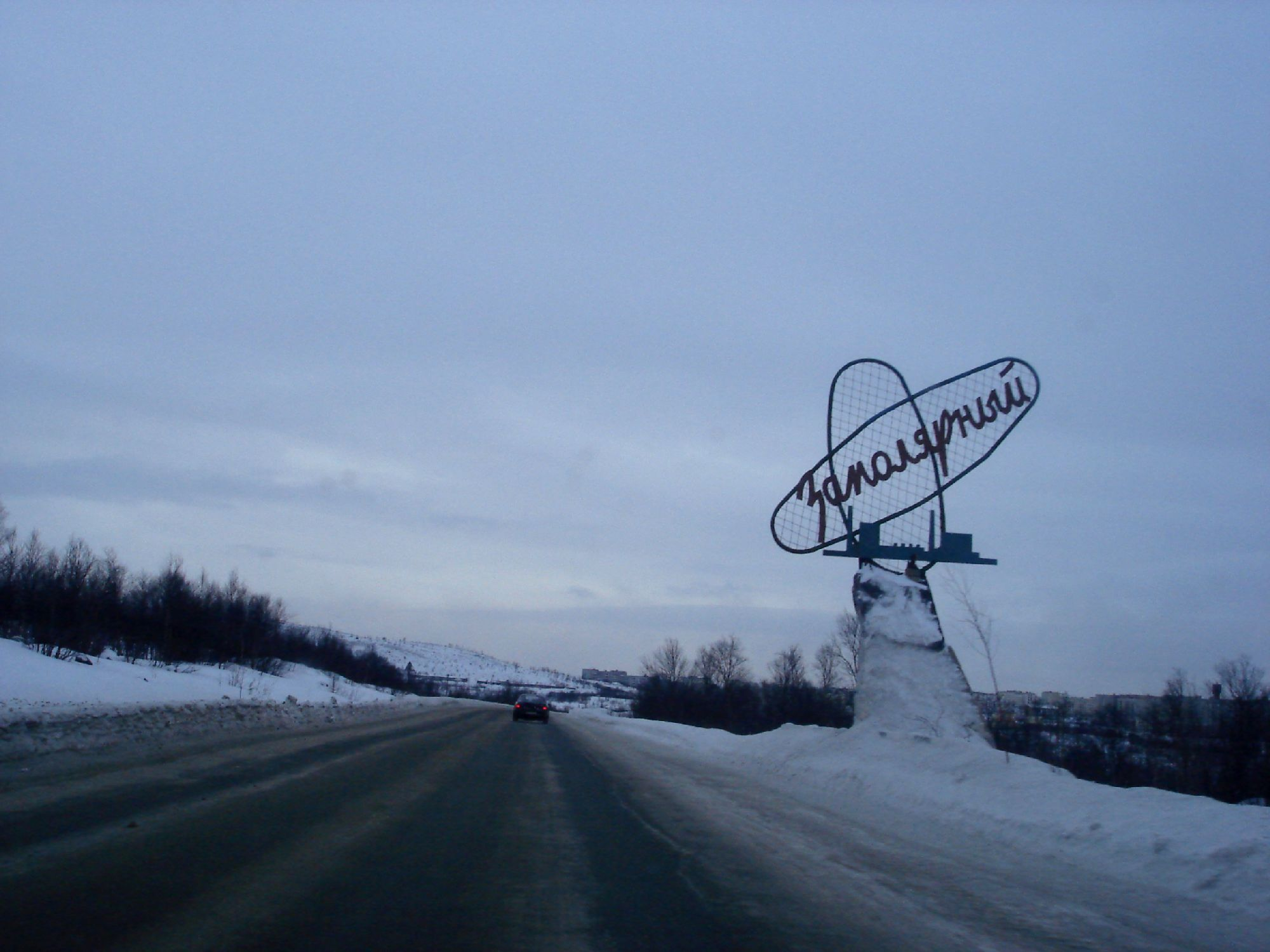 Заполярный: Пилон в Заполярном